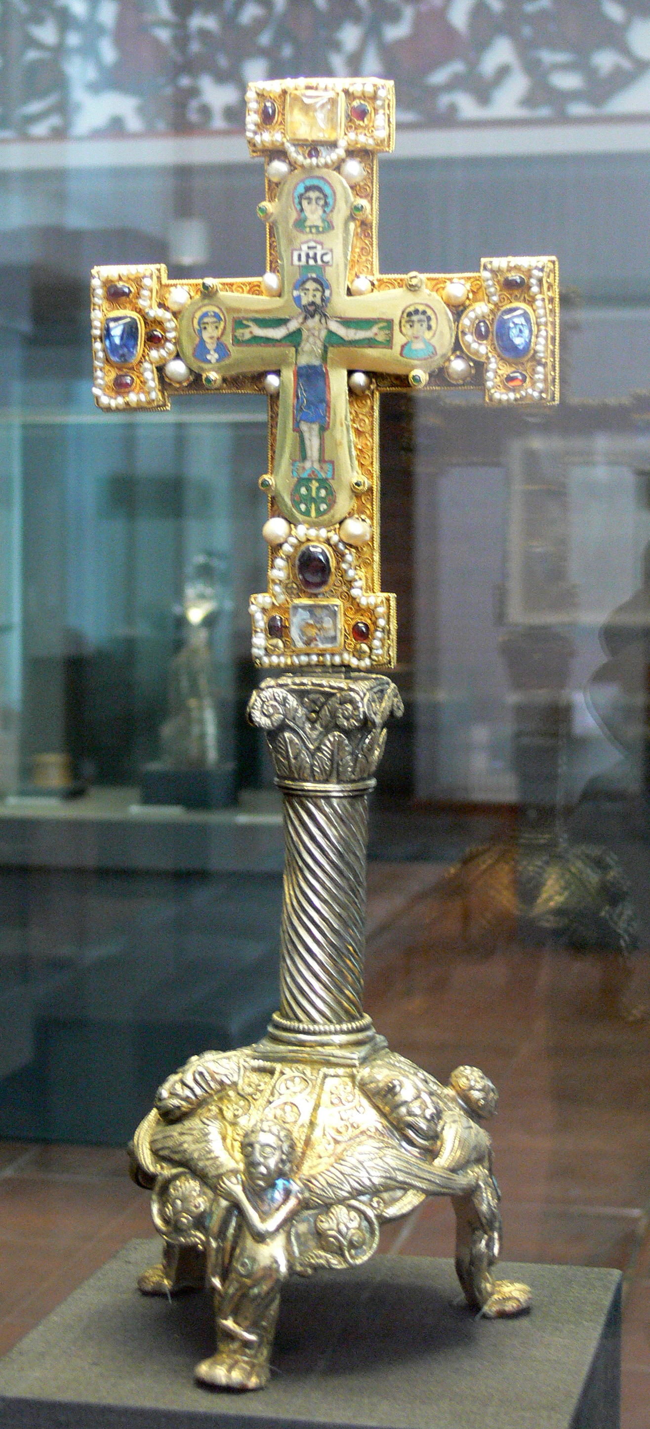 Welfenkreuz; Kunstgewerbemuseum Berlin; Inv. Nr. W 1